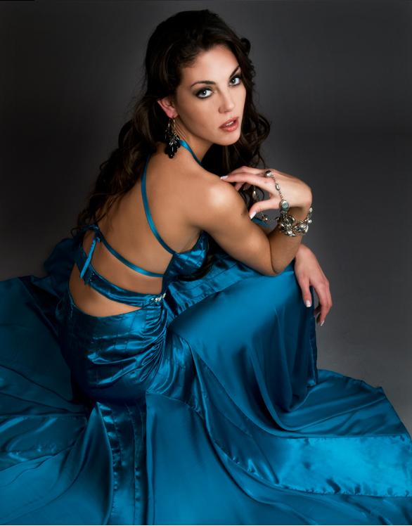 foto de la Miss Universo Argentina 2009, Johanna Lasic en una produccion de fotos para una diseñadora argentina.